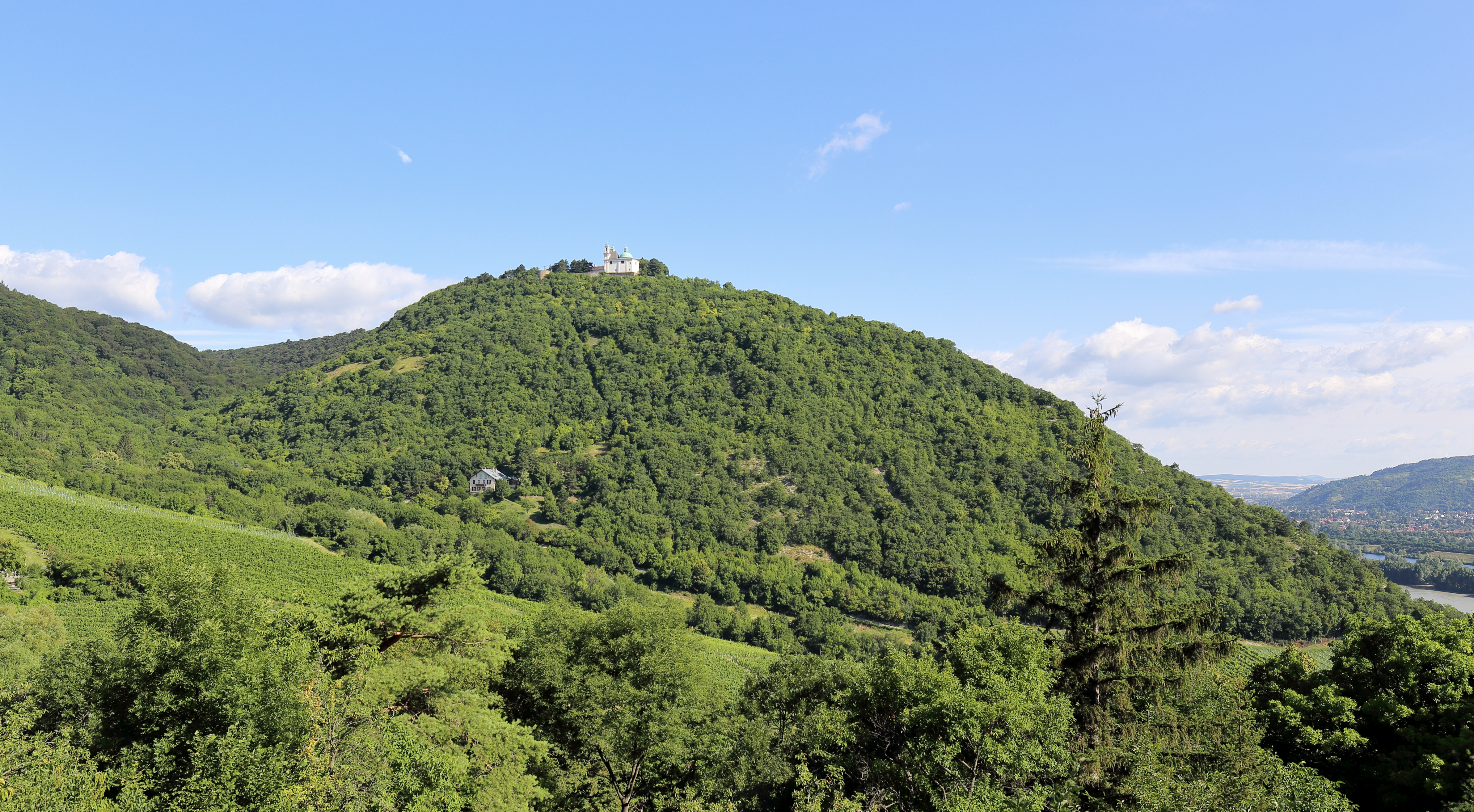 Südsüdostansicht des 425 Meter hohen Leopoldsberges im 19. Wiener Gemeindebezirk Döbling mit der Leopoldsbergkirche, dem Heimkehrer-Gedächtnismal und der Leopoldsbergburg. Links der Anstieg des 484 Meter hohen Kahlenberges und rechts von vorne nach hinten: Die Donau, die Donauinsel, das Entlastungsgerinne Neue Donau, die Marktgemeinde Langenzersdorf und der 385 Meter hohe Bisamberg.